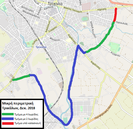 Ο χάρτης της μικρής περιμετρικής οδού Τρικάλων This map may be incomplete, and may contain errors. Don't rely solely on it for navigation.